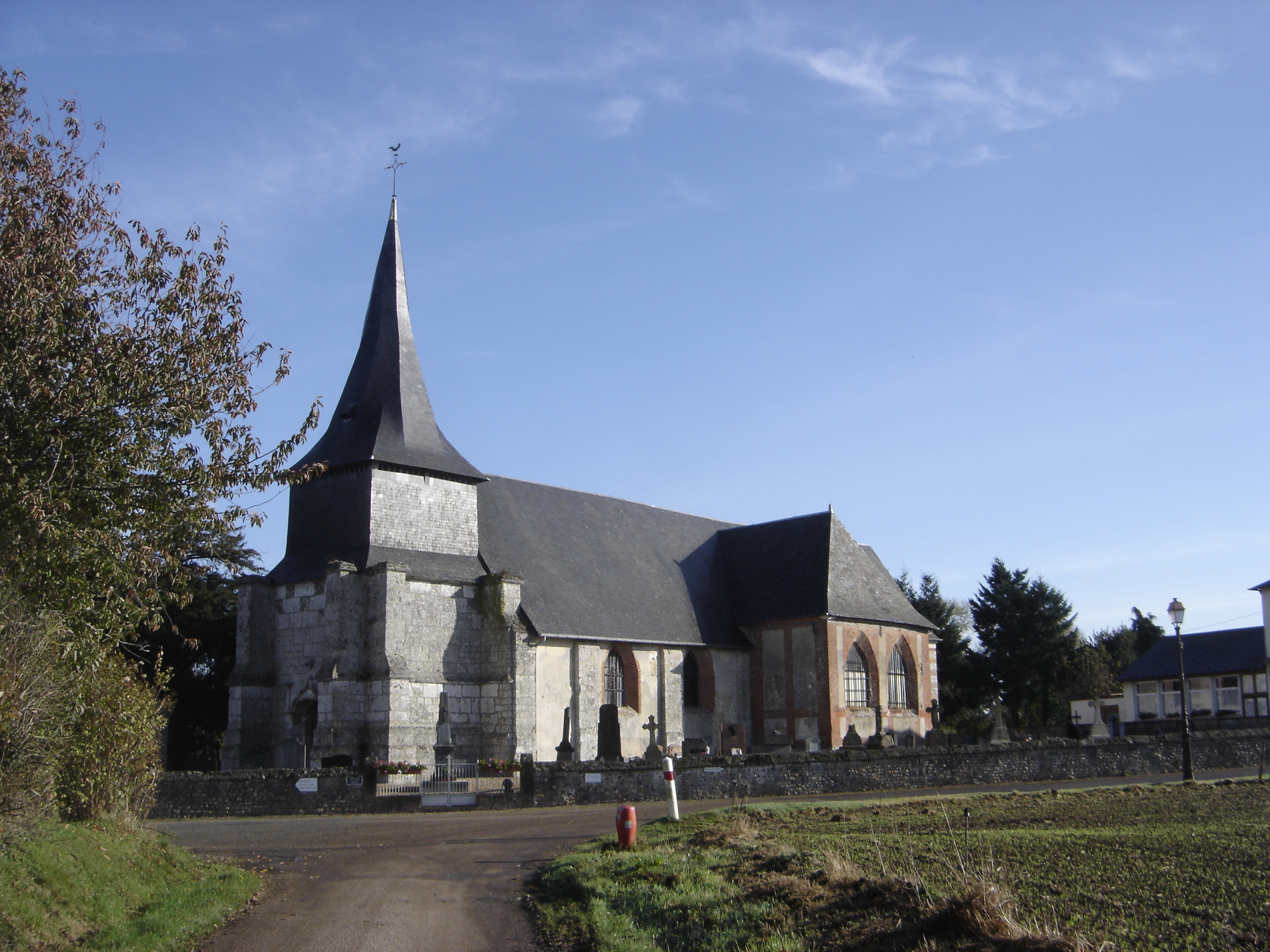 église de Martainville - Eure - France